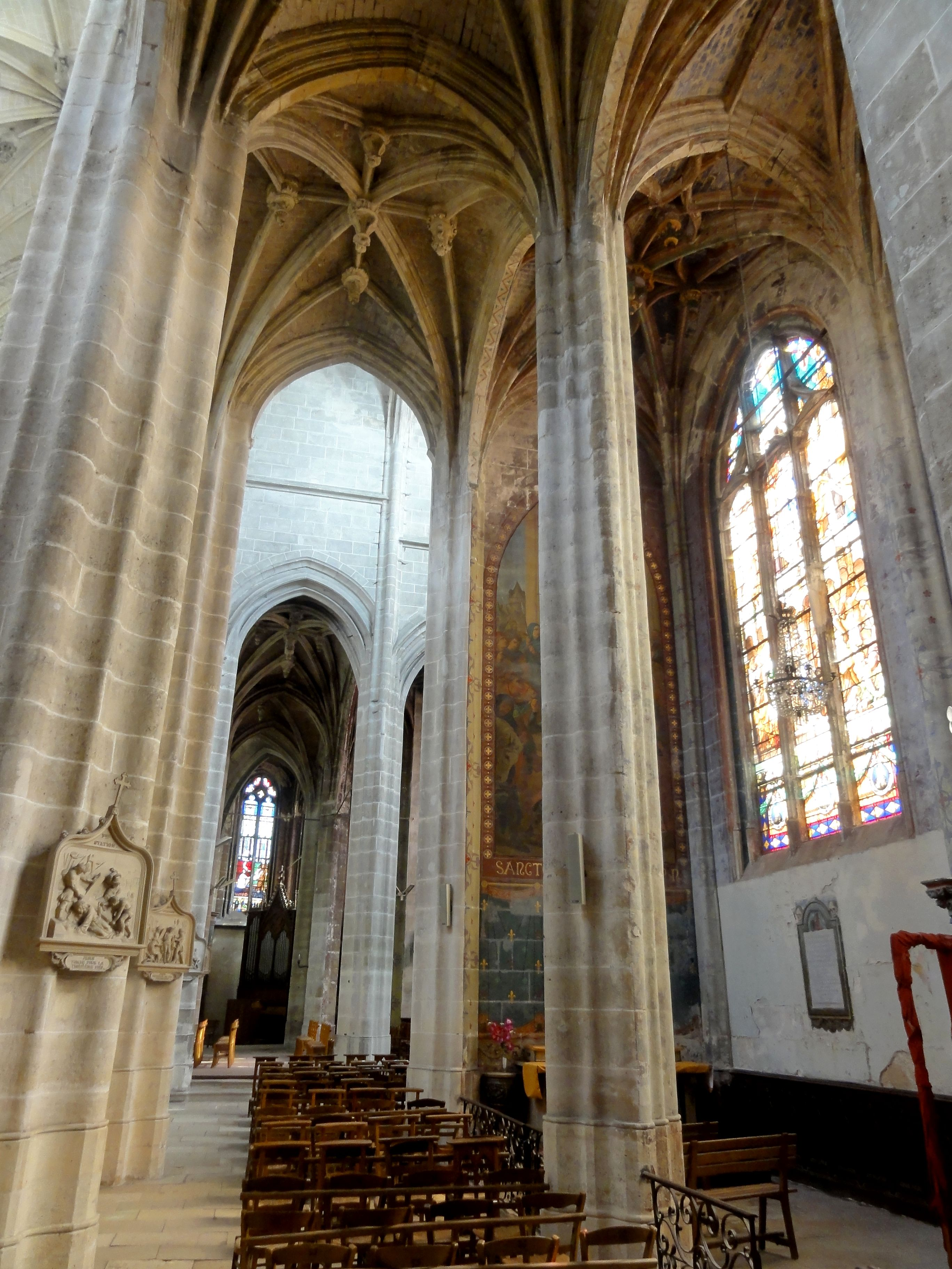 Collatéral sud et chap. St-Louis, vue vers l'est.